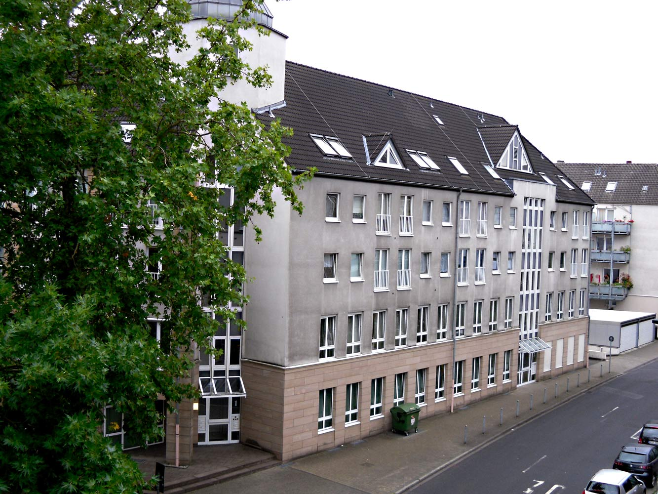 Building Weststrasse 1-3, Duesseldorf, Germany